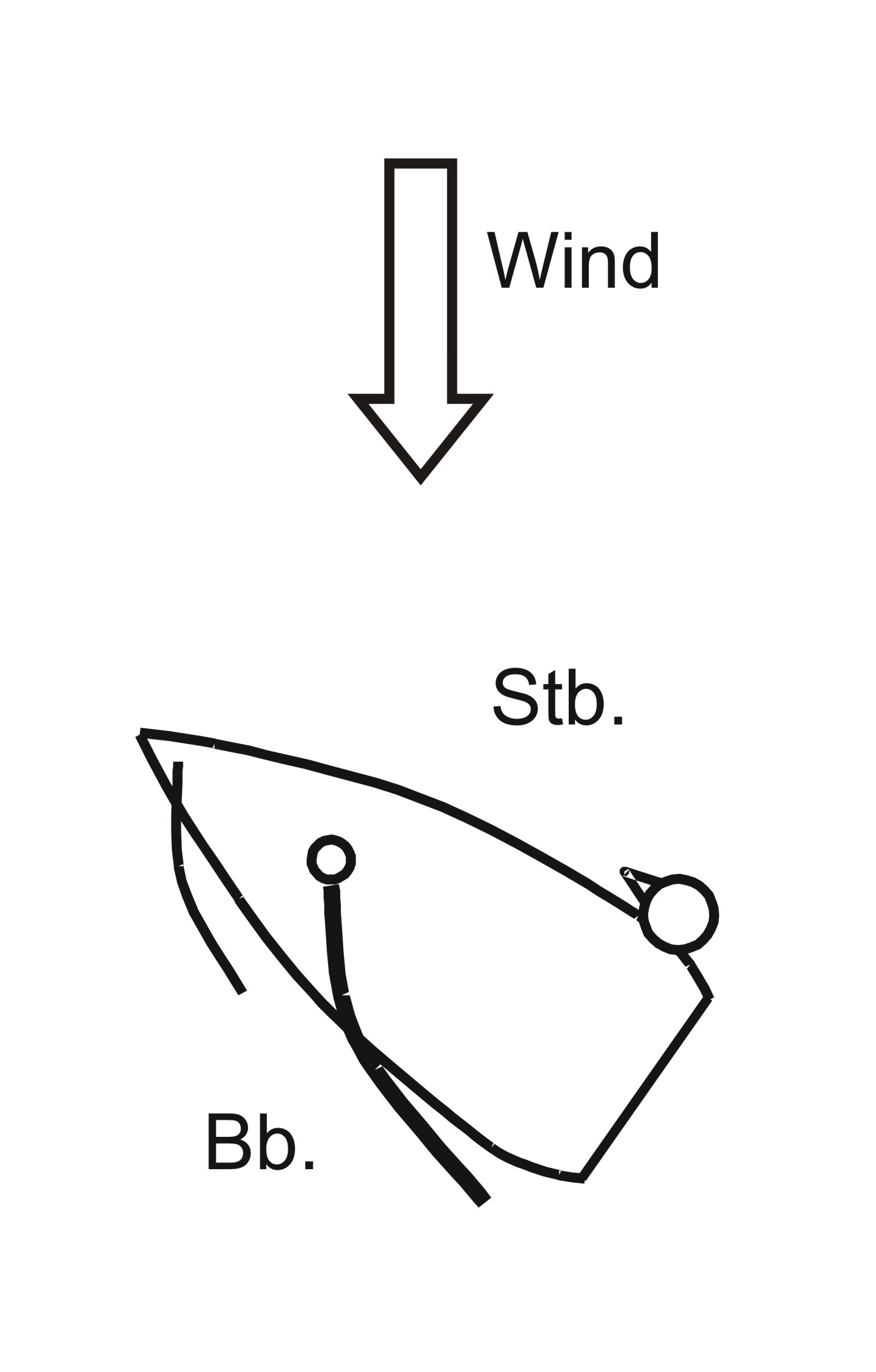 Führung des Großsegels auf der Backbordseite: Backbordbug